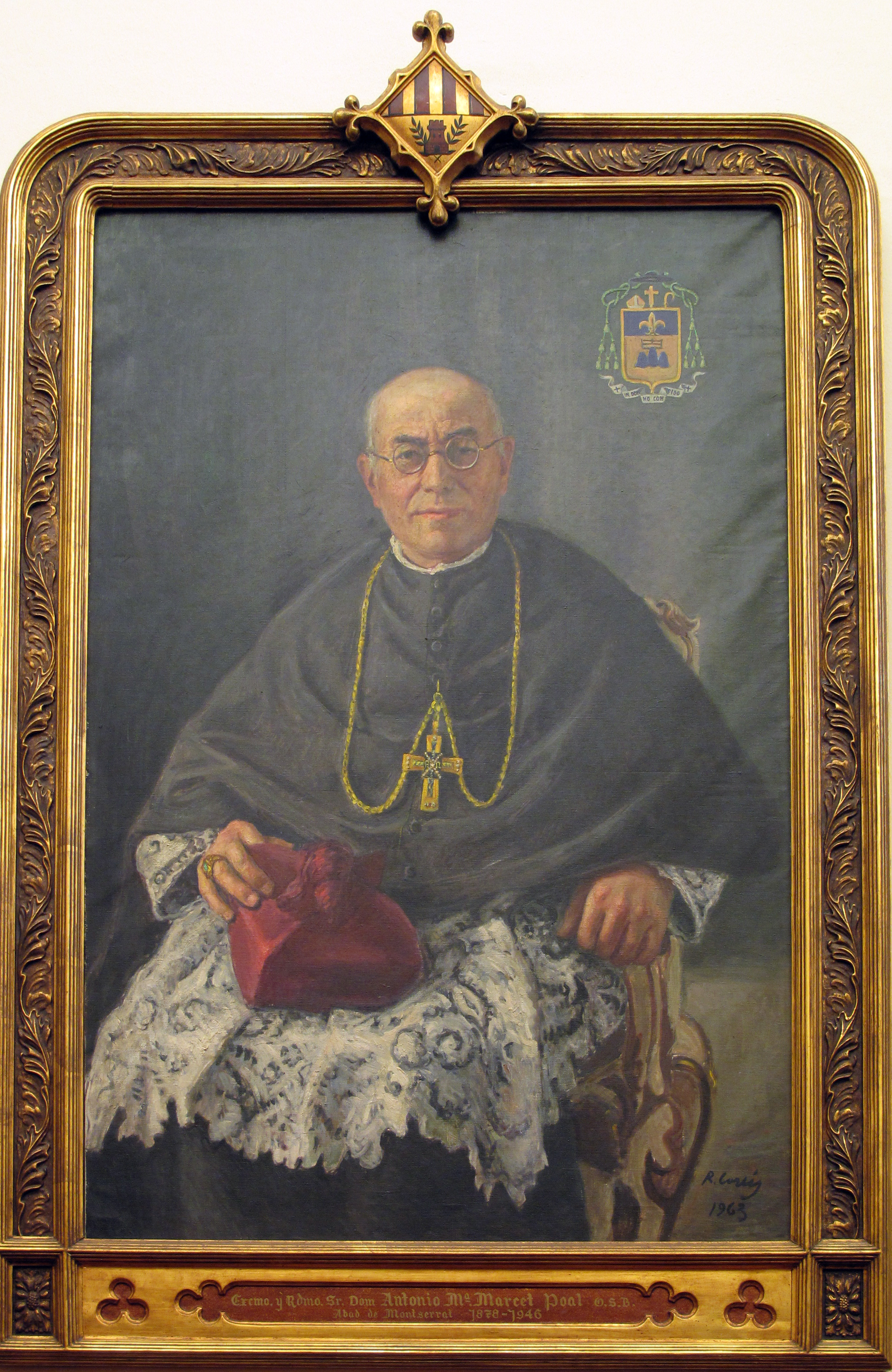 Antoni Maria Marcet i Poal, Ajuntament de Terrassa